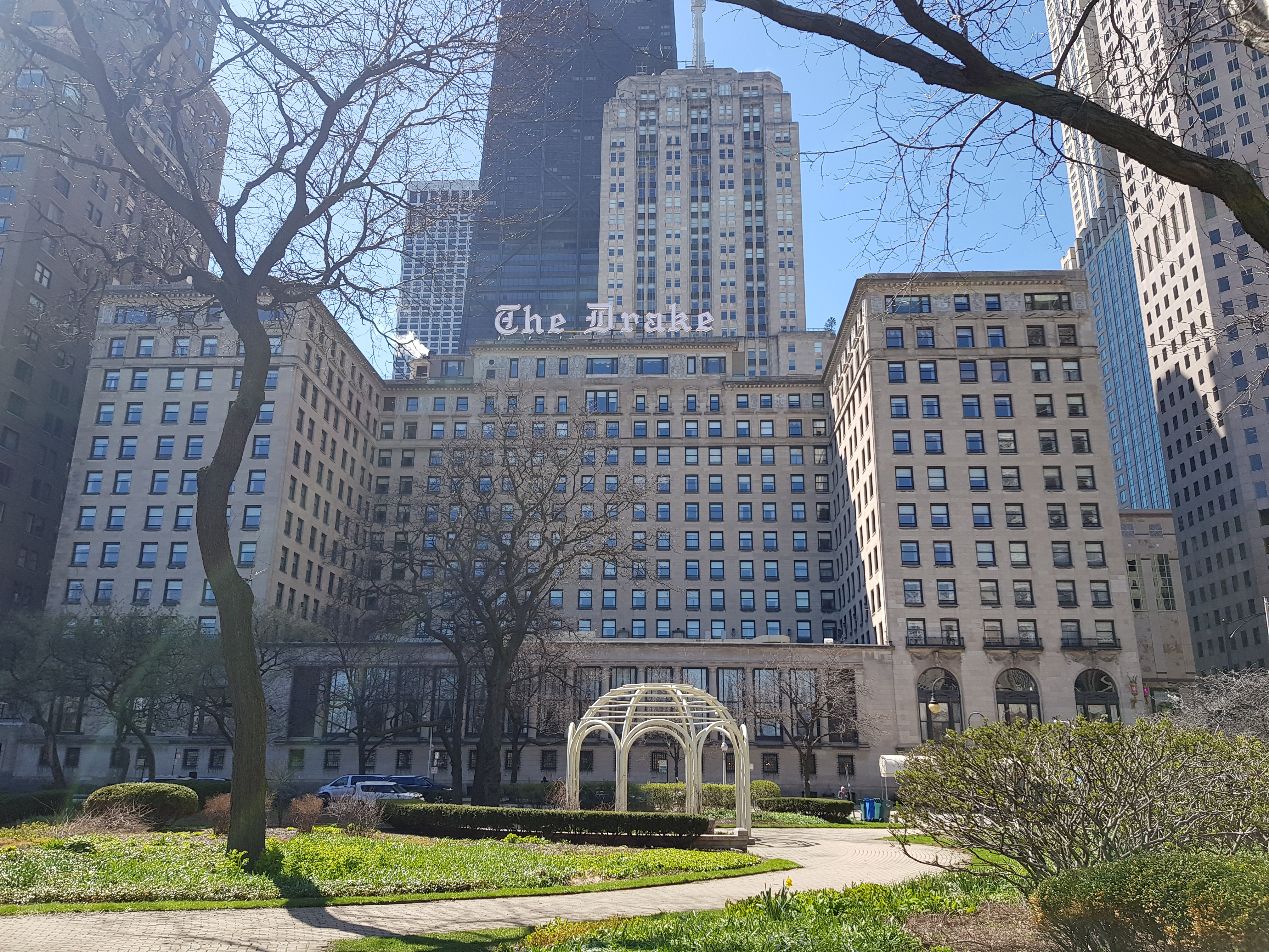 Façade nord du Drake Hotel à Chicago.